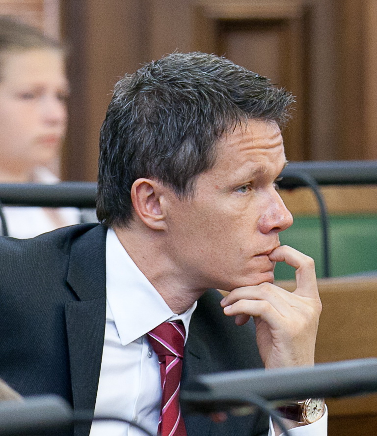 Edgars Šneps